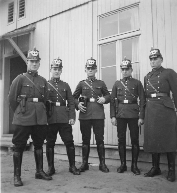 Polizei d. Zigeuner ..., Marzahn [Text nicht lesbar]